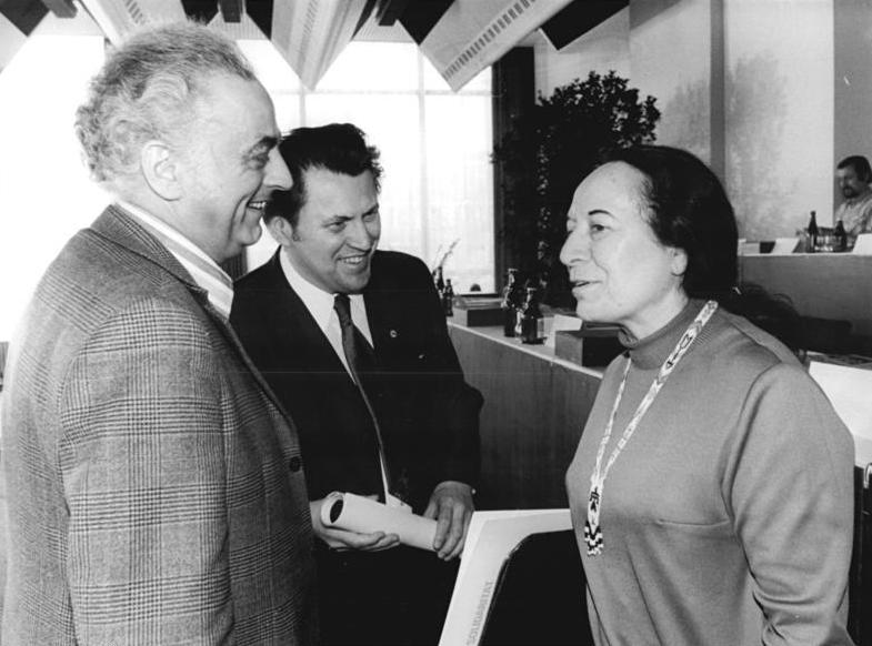 ADN-ZB Katscherowski-30.5.74 Karl-Marx-Stadt: Künstlerkongreß. In einer Pause des dritten Beratungstages des VII. Kongresses des Verbandes Bildender Künstler unterhielten sich Prof. Lea Grundig, Mitglied des ZK der SED, Ehrenpräsidentin des Verbandes, Horst Weiß, 1. Sekretär des Verbandes, und Gerhard Voigt, Gebrauchsgrafiker und stellvertretender Präsident des Verbandes (v.l.n.r.)